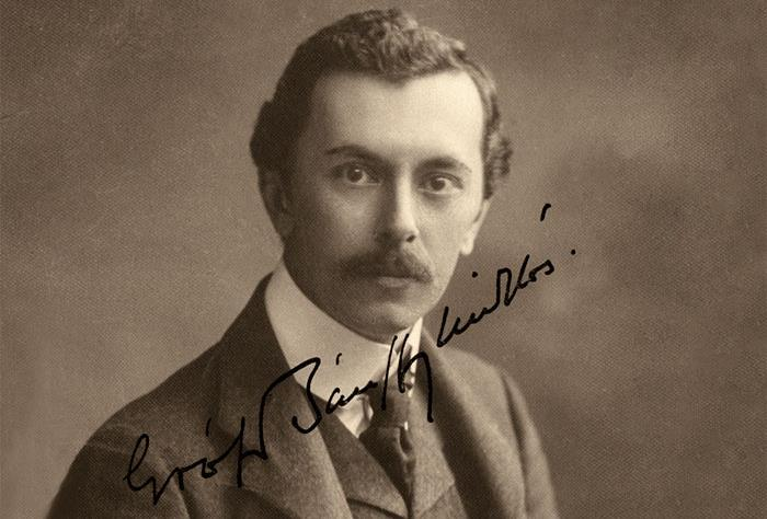 Gróf losonci Bánffy Miklós, teljes nevén: Bánffy Miklós Pál Domokos (Kolozsvár, 1873. december 30. – Budapest, 1950. június 5.): író, grafikus, díszlet- és kosztümtervező, színpadi rendező, politikus, külügyminiszter. Íróként a Kisbán Miklós álnevet is használta. Az egyik legnagyobb erdélyi földbirtokos család tagja. Vele férfi ágon kihalt a losonci Bánffy család grófi ága. Külügyminiszter volt 1921-1922-ben, ő érte el, hogy a trianoni döntést követően népszavazást írtak ki, amelynek eredményeképpen Sopron magyar maradt.